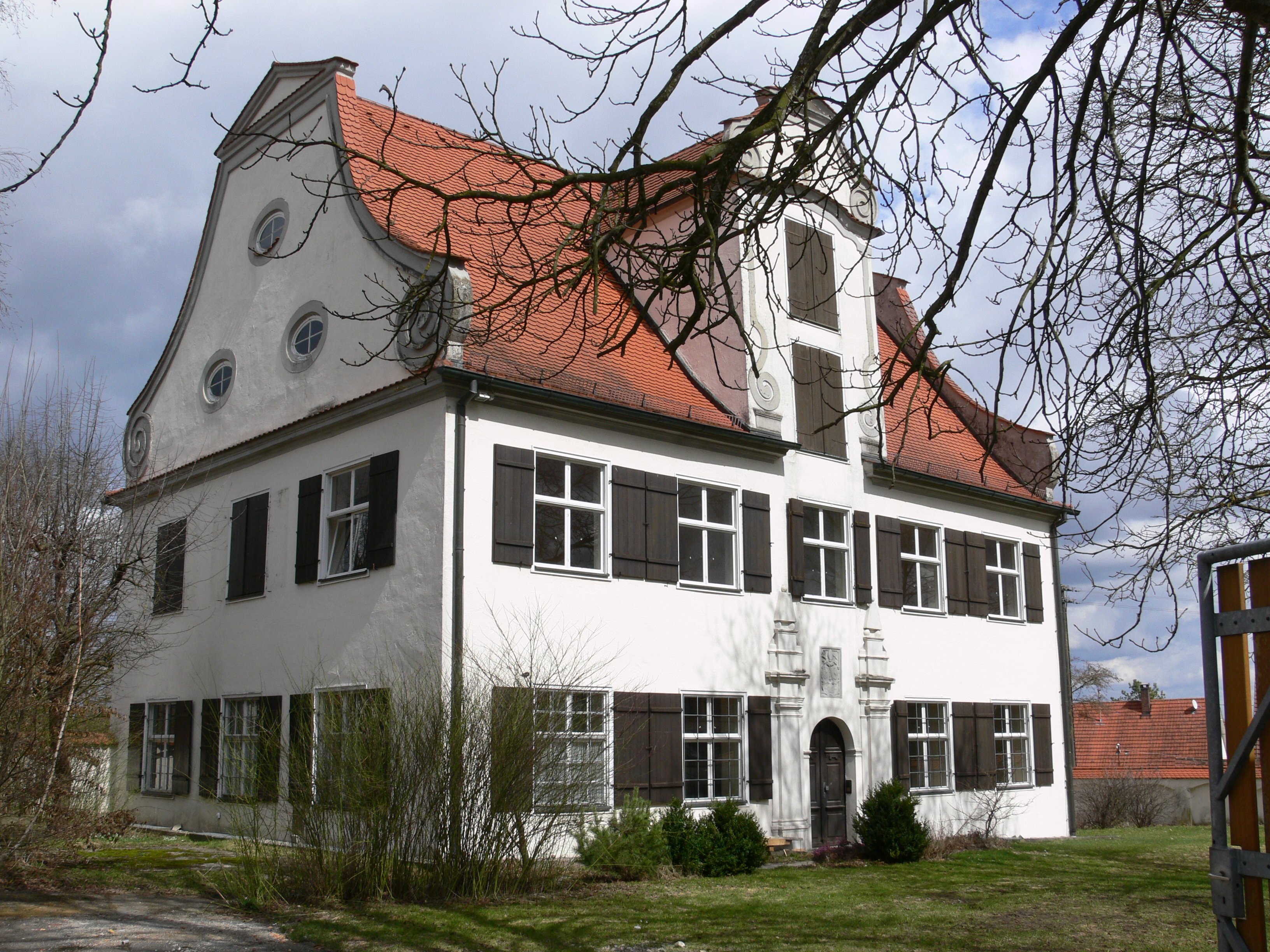 Pfarrhaus Otterswang Bad Schussenried, Landkreis Biberach, Baden-Württemberg